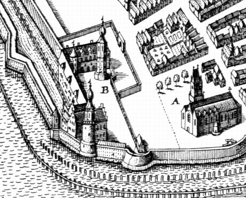 Ausschnitt aus dem Emder Stadtplan von Matthäus Merian aus dem Jahre 1640. Zu sehen ist die Emder Burg nach der Emder revolution.